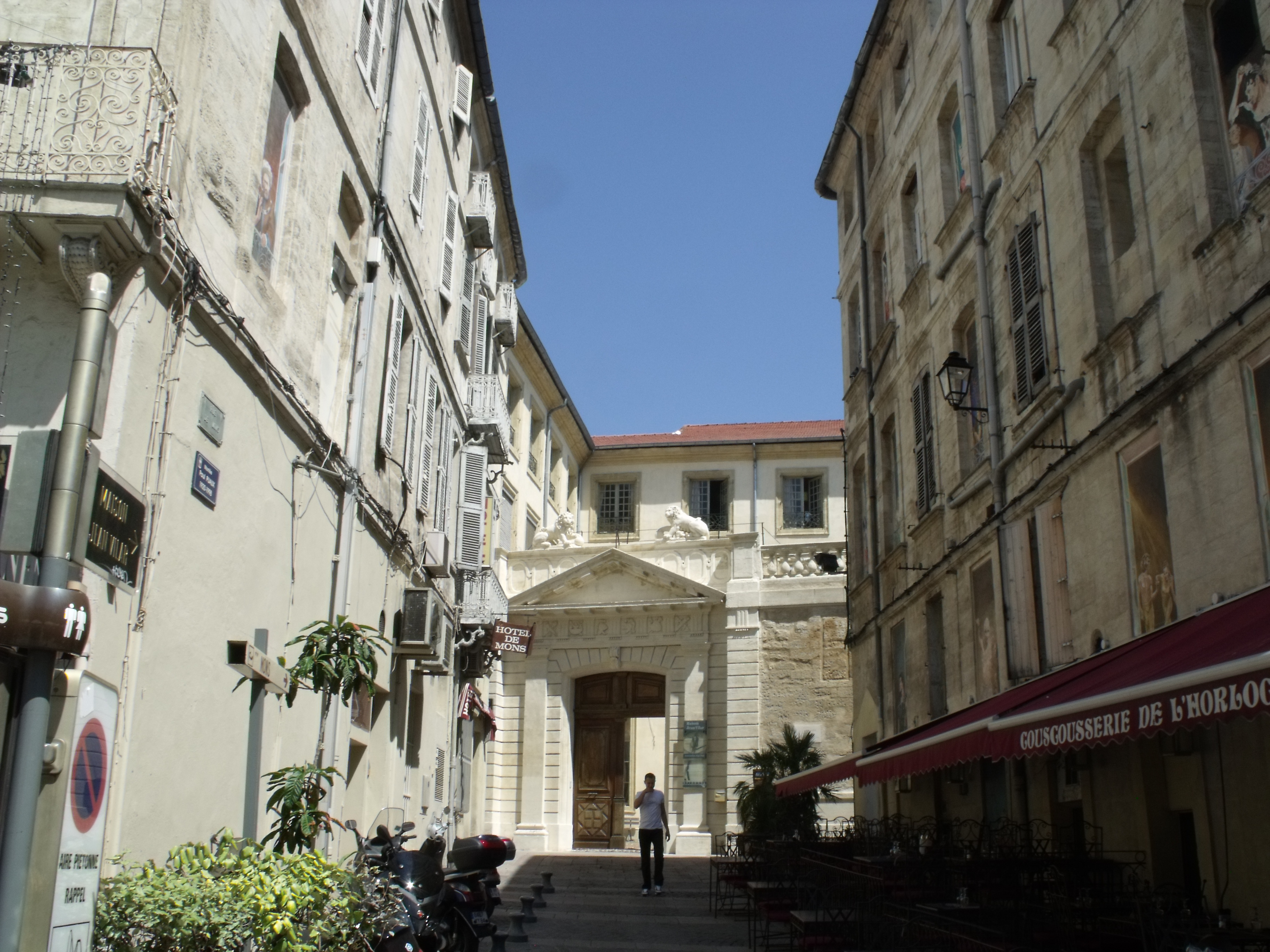 Ancienne demeure des vicomtes de Turenne donnée à la fin du XIVe s par l'antipape Clément VII au cardinal de Thury